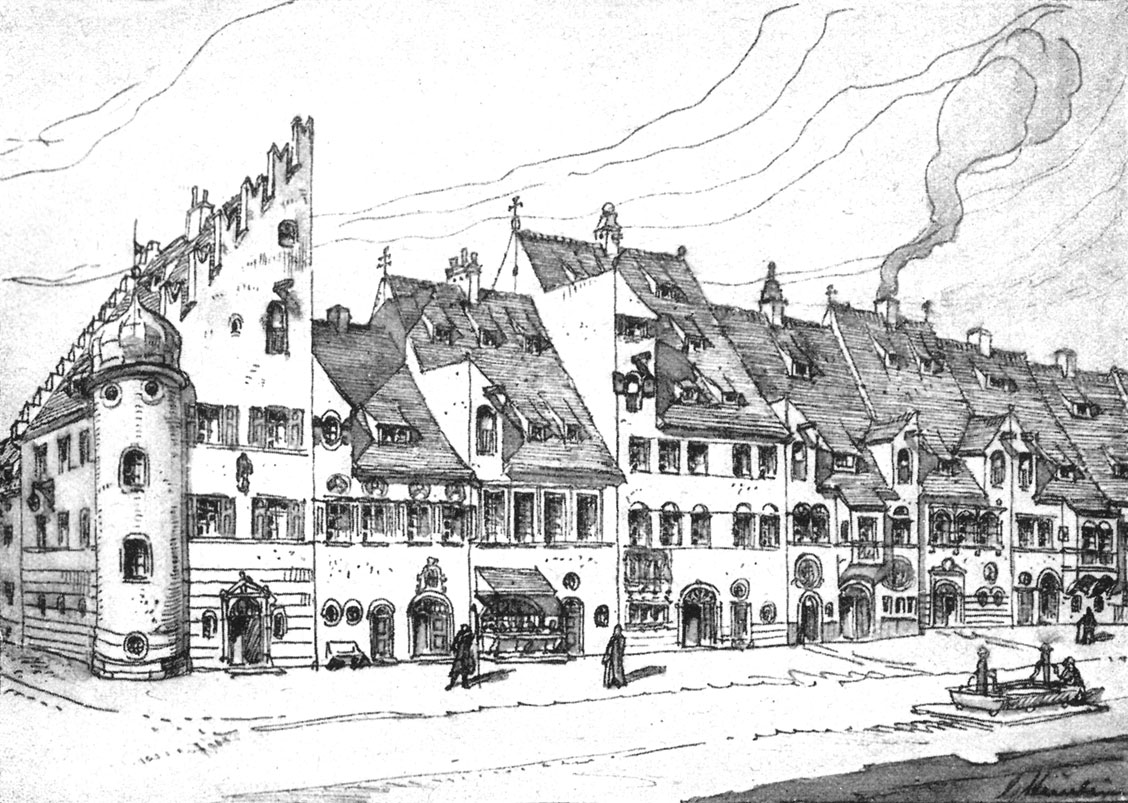 Abb. 52: Nordostseite der Neuhauserstraße (beim Karlstor).